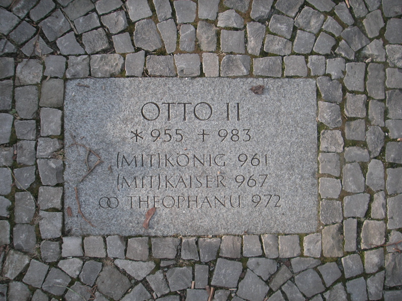 Der Weg der Ottonen: OttoII Fotografiert am Magdeburger Domplatz.